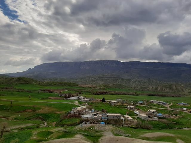 کوردی: گوندی بەڕوێن